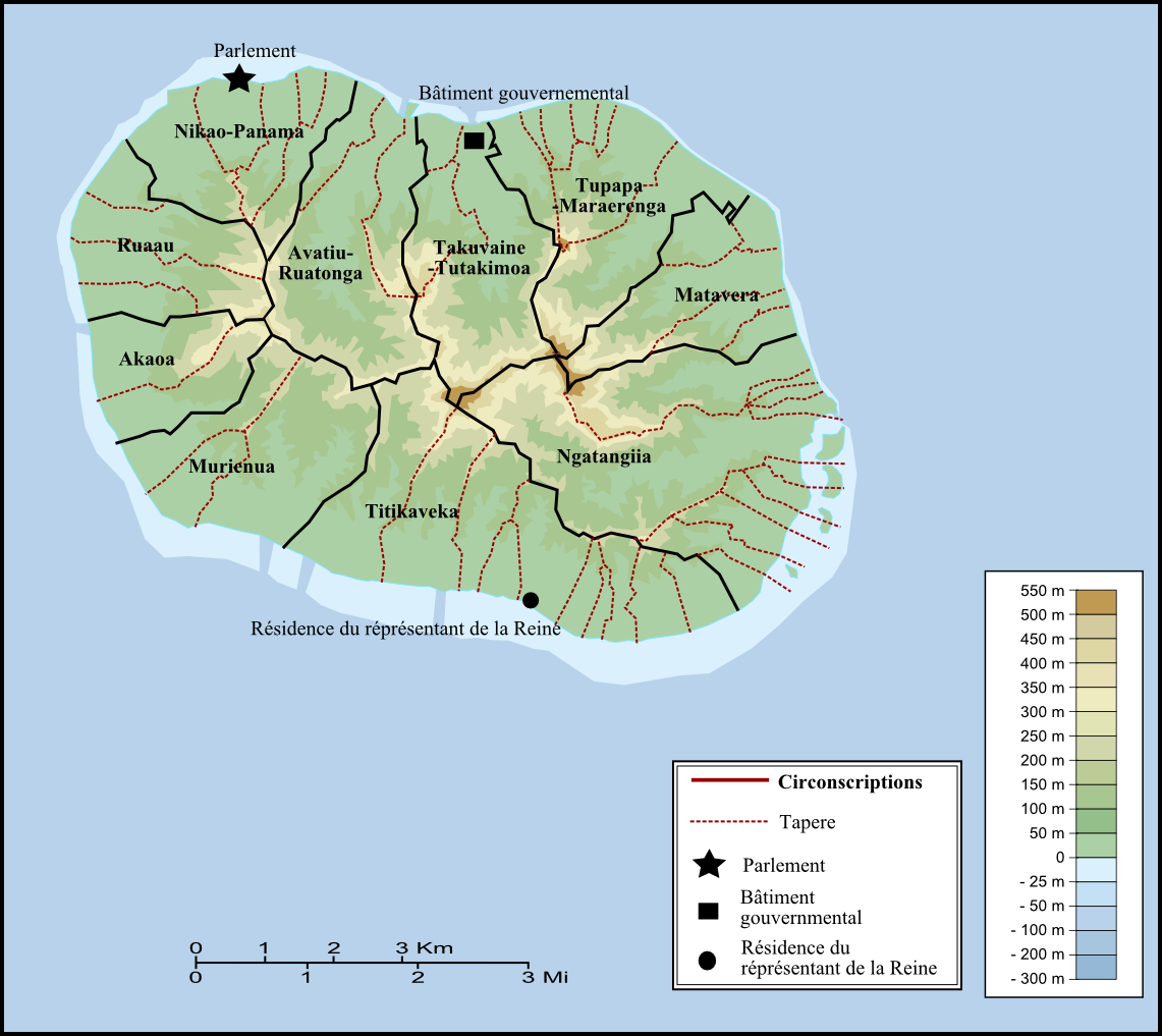 Constituencies of Rarotonga/ciconscriptions électorales de Rarotonga